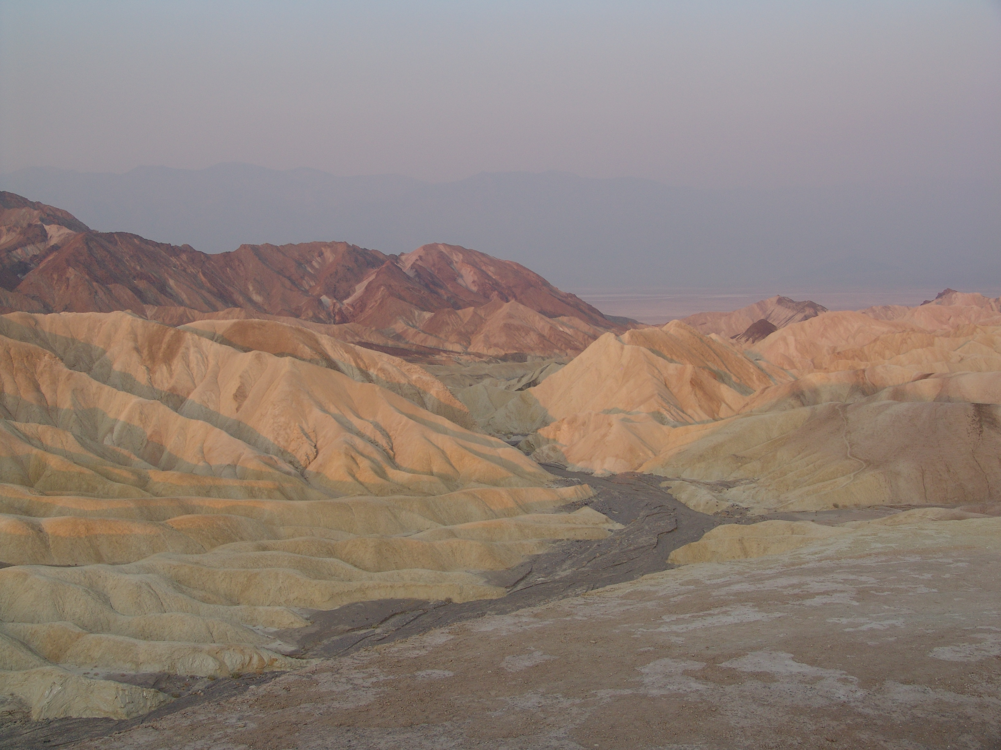 Death Valley bij zonsopkomst. Tijdens de zonsopkomst was het al dik 30 graden Celsius!